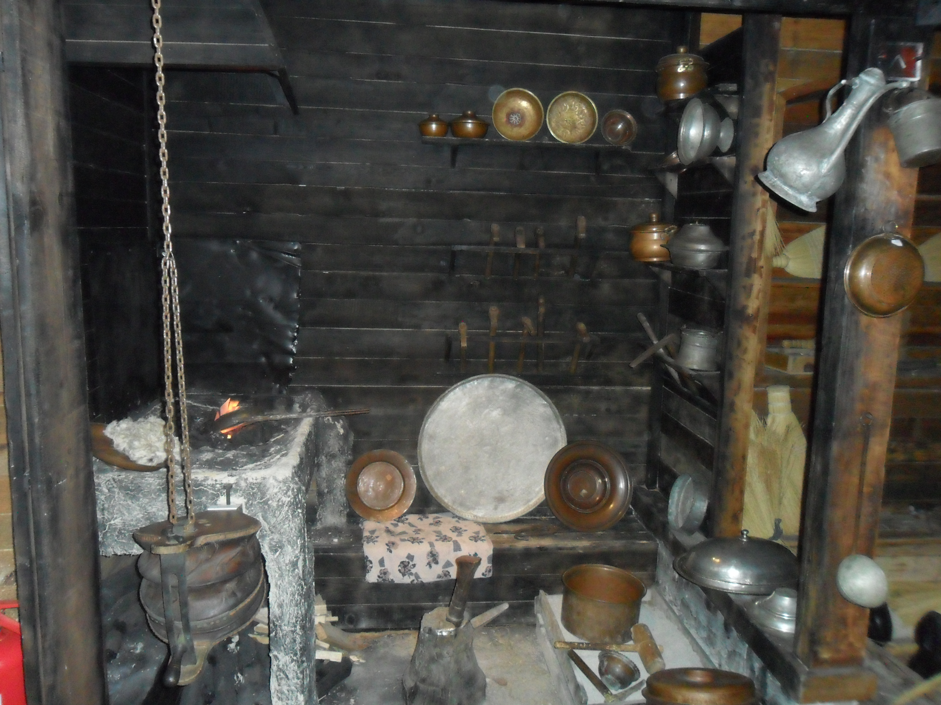 Samsun Kent Müzesi'nde yer alan Osmanlı dönemi demirci dükkanı.